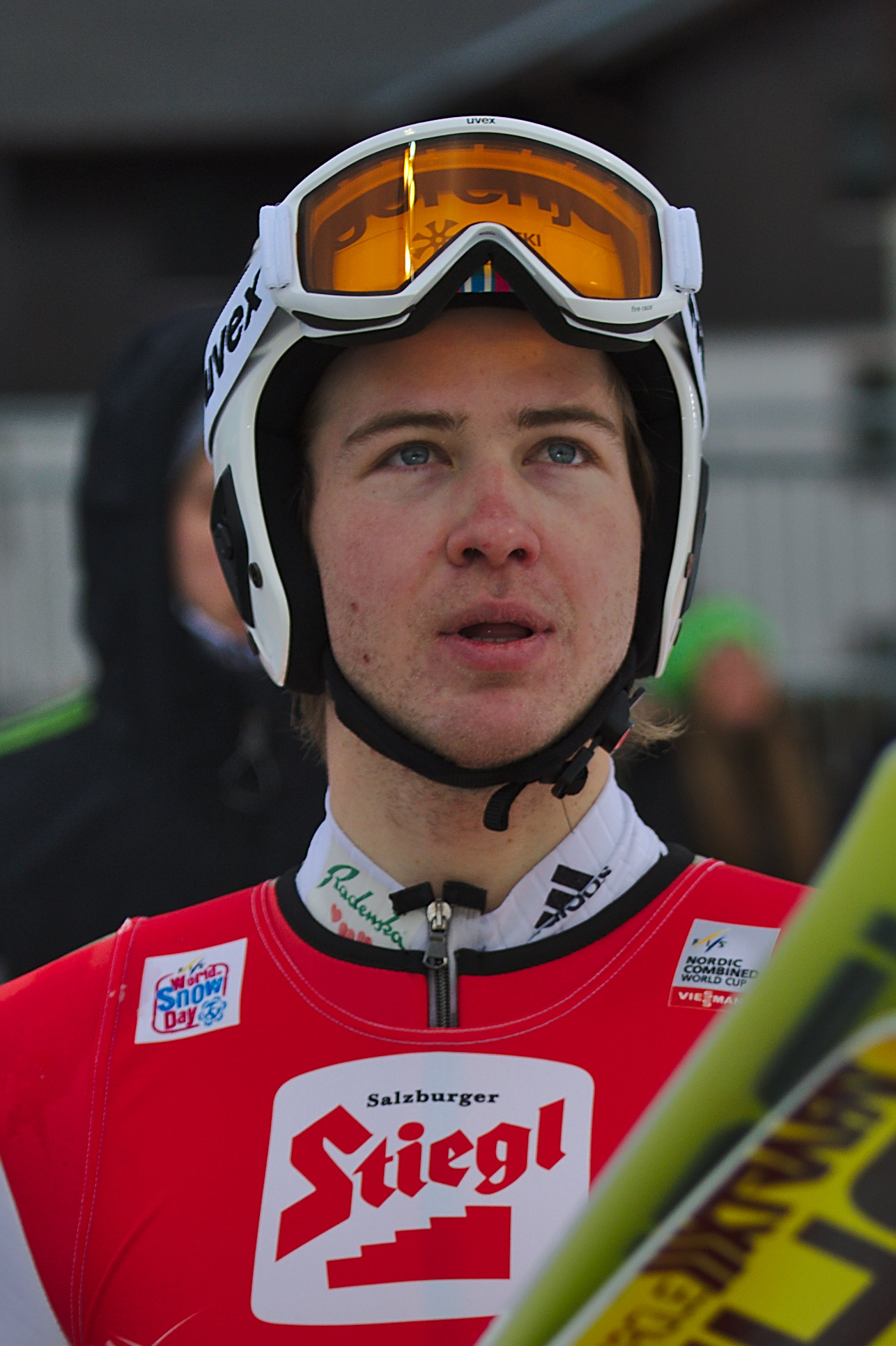 FIS Worldcup Nordic Combined Ramsau 2016. Bild zeigt Marjan Jelenko (SLO)